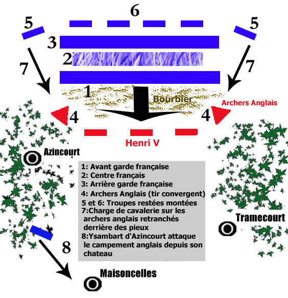 carte tactique de la bataille d'Azincourt traduite en Français. El mismo es de autoría propia (usuario: Eamezaga).